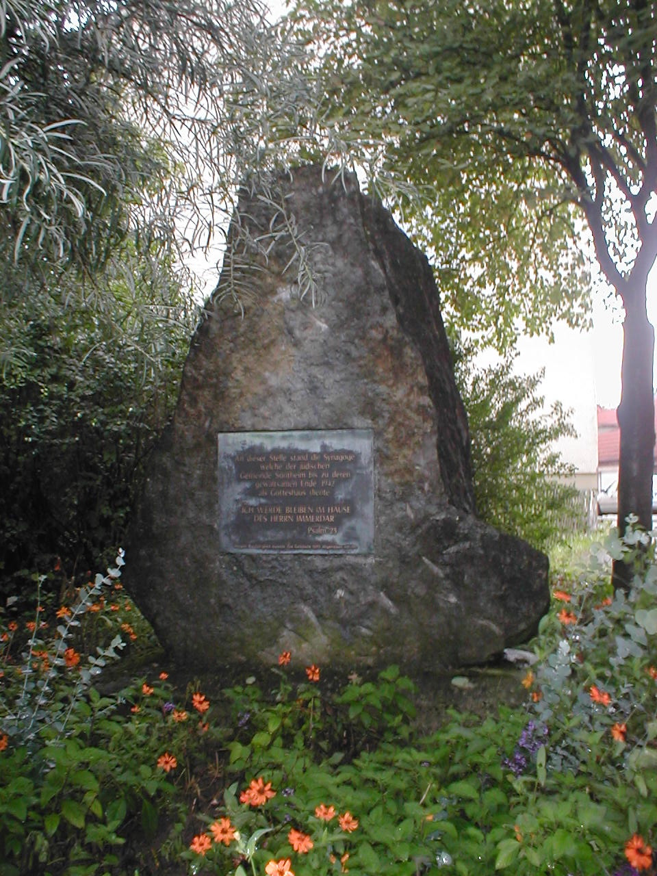 Synagogengedenkstein im Judengängle am Deinenbach in Heilbronn-Sontheim